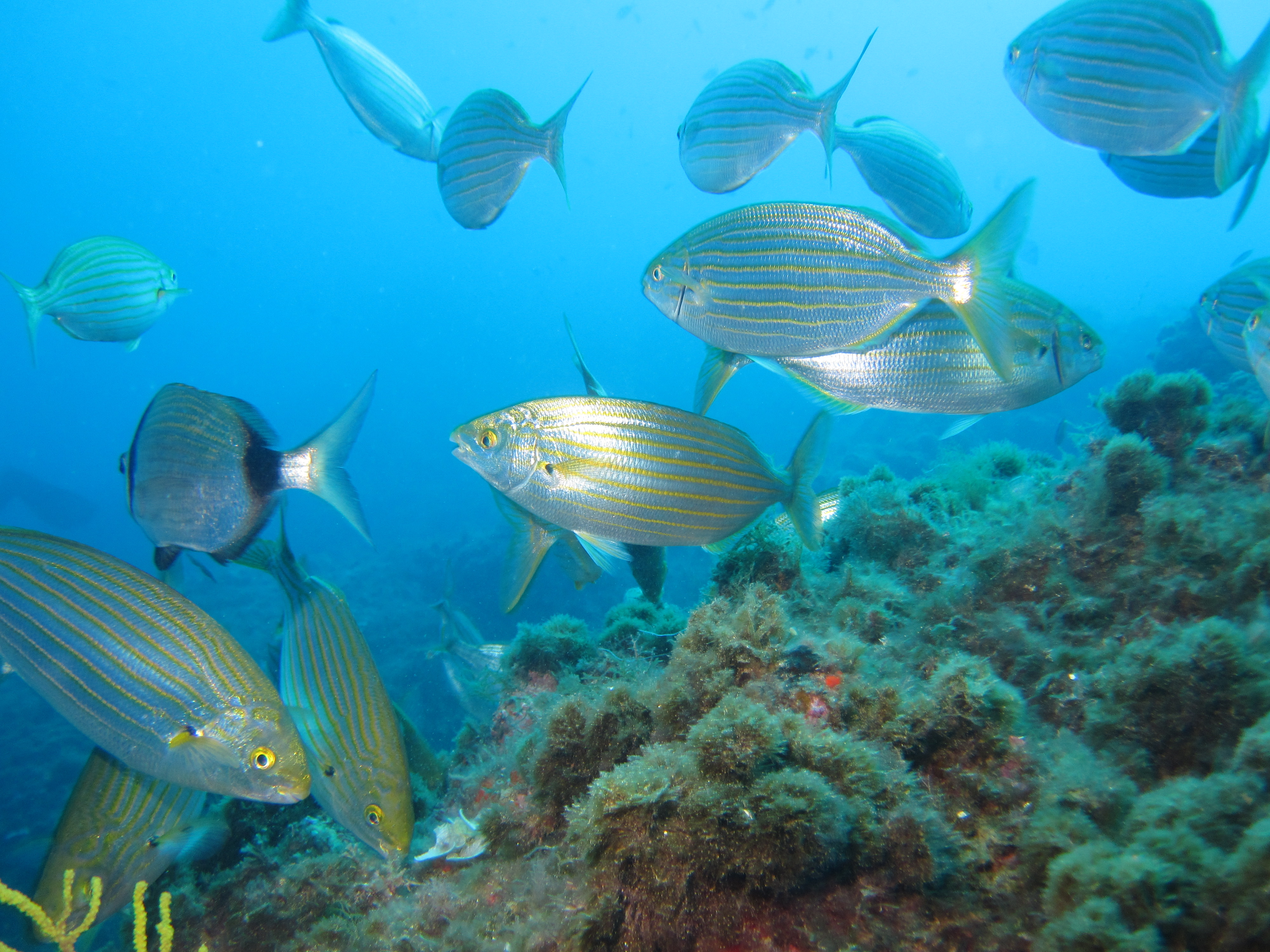 Goldstriemen